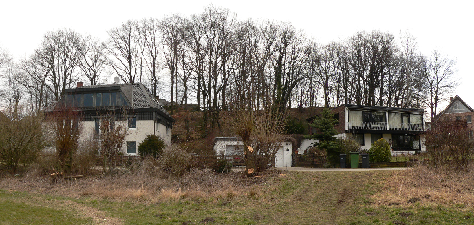 Scheverlingenburg